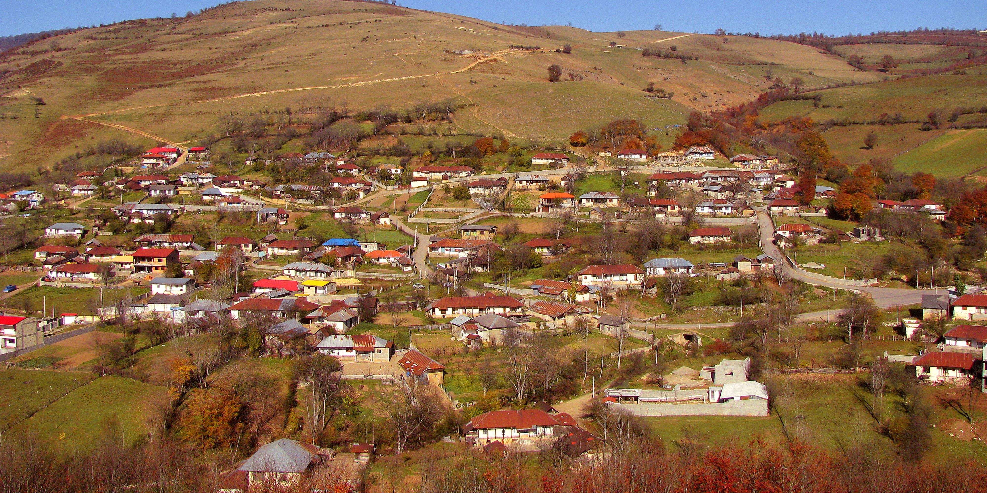 عکس توسط الف میم پاشا در پاییز 1389 گرفته شده است